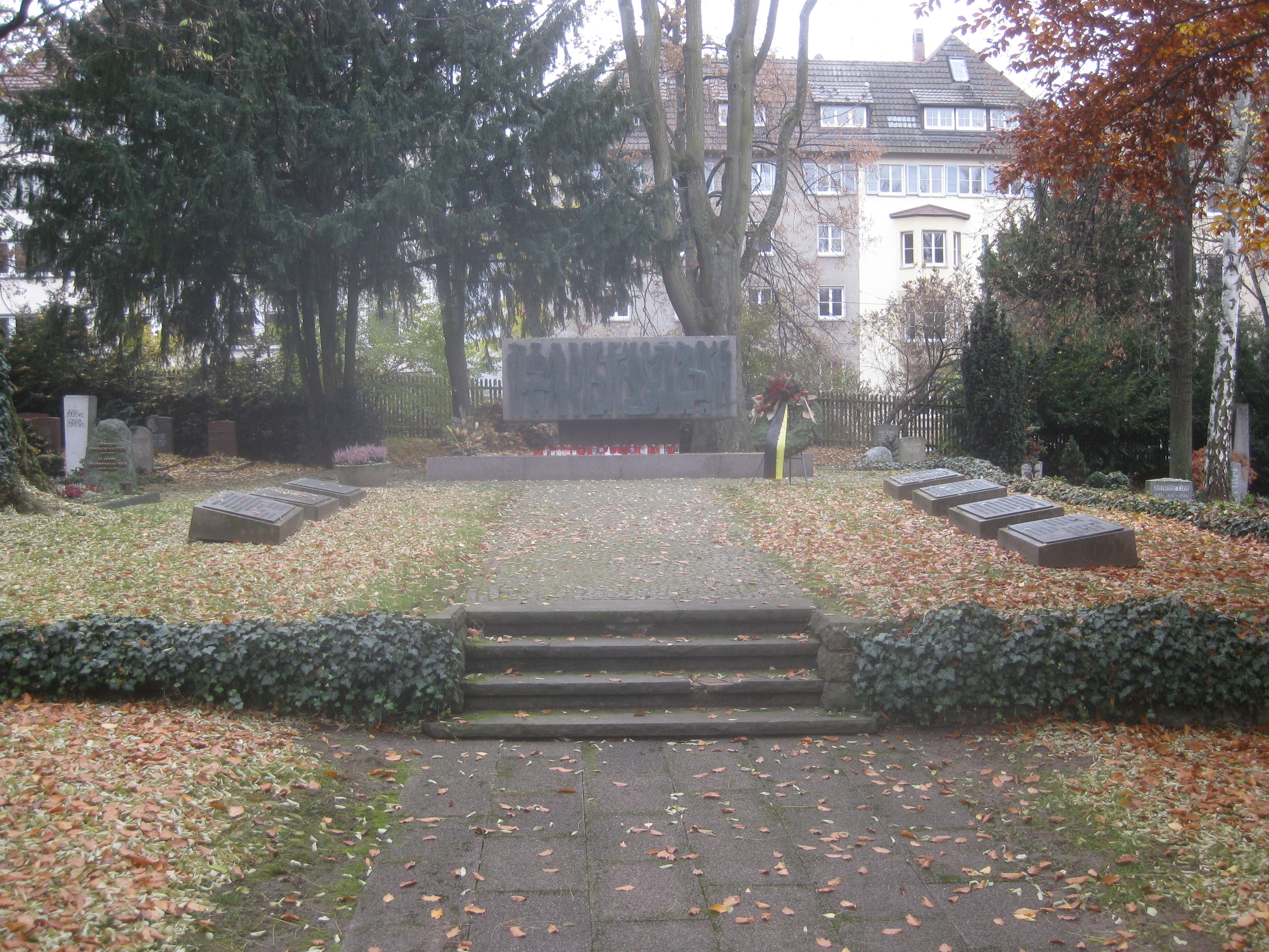 Stuttgart, Fangelsbachfriedhof, nicht näher bezeichnetes "Mahnmal" für Gefallene des Deutsch-Französischen Kriegs 1870/1871 (diese Widmung legen die sieben Gedenkplaketten, die auf Liegesteinen vor dem Mahnmal angebracht wurden, nahe).